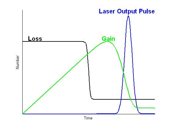 גרף המתאר תהליך של Q-Switch בלייזר